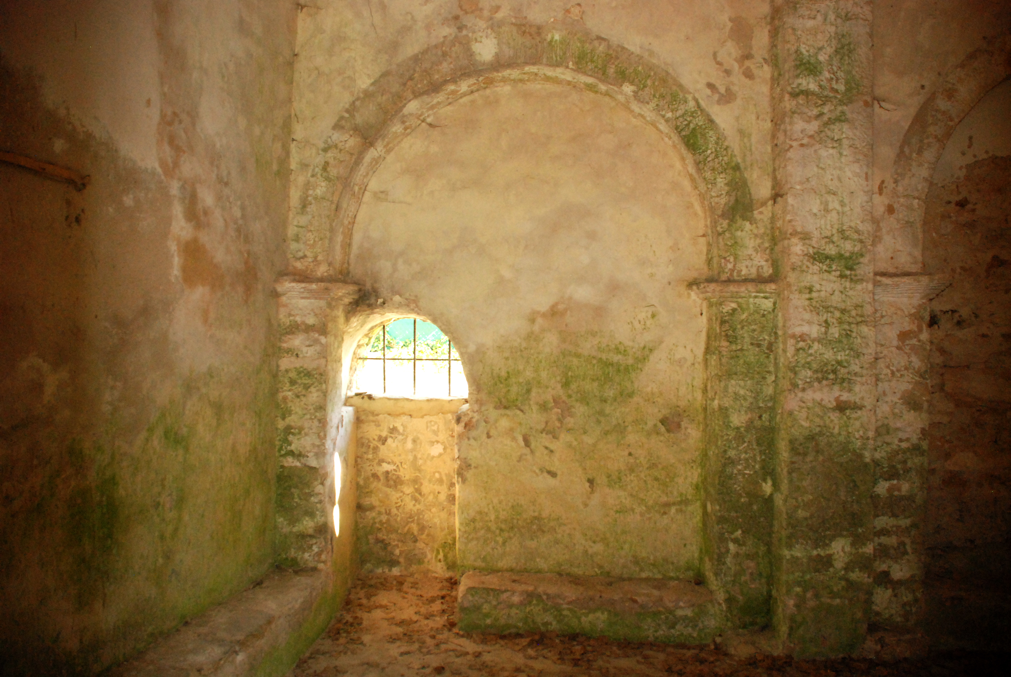 France - Gard - Chapelle Saint-Saturnin de Gaujac